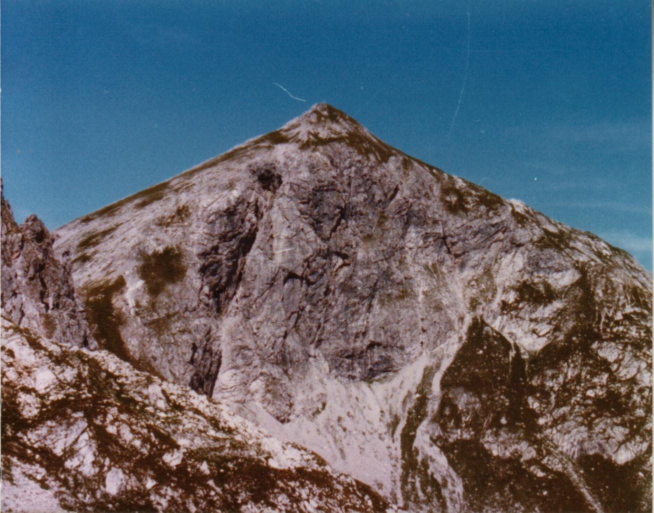 Liechelkopf von Süden